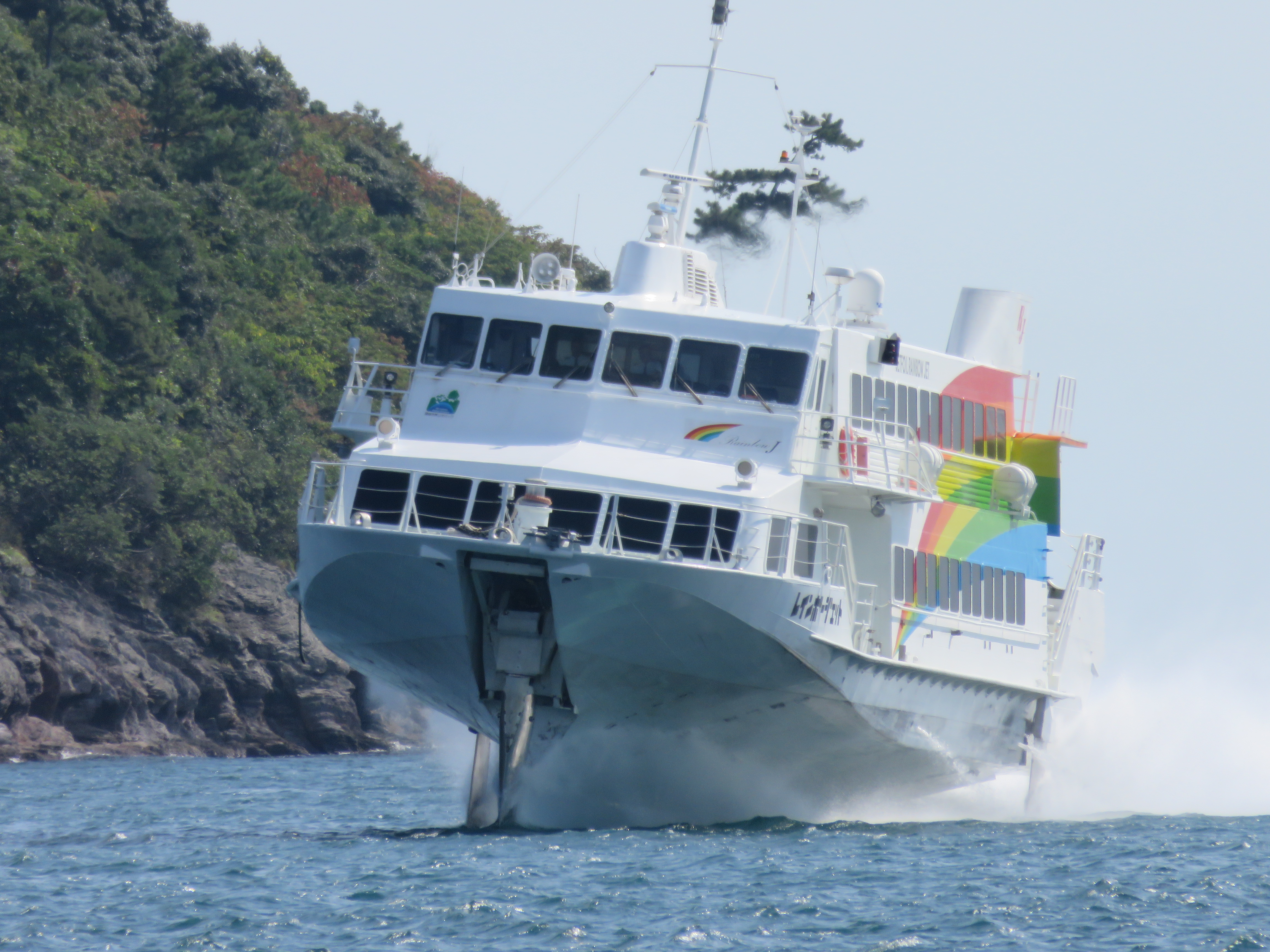 西郷港に向け船速を落としつつある隠岐汽船のジェットフォイル「レインボージェット」。